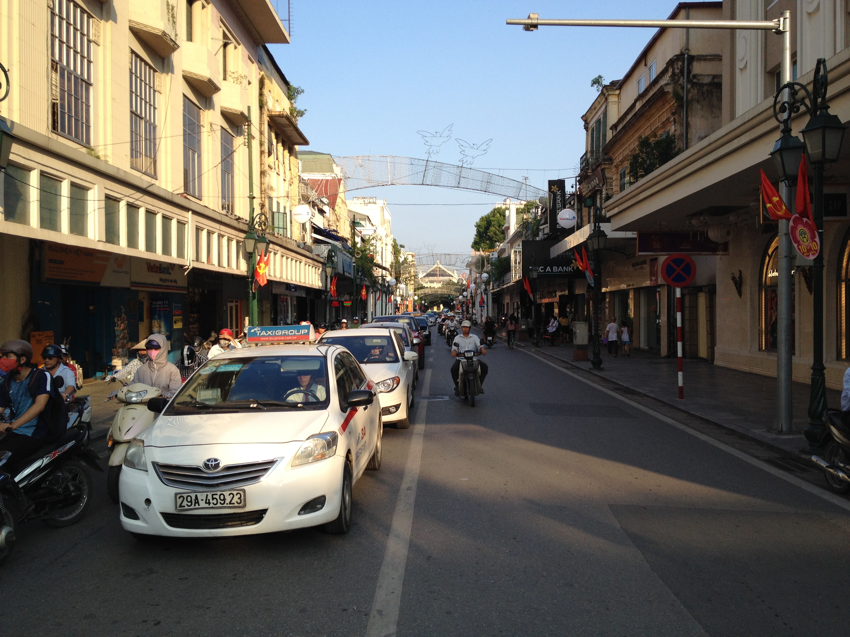 Phố Tràng Tiền, Hà Nội, Việt Nam.